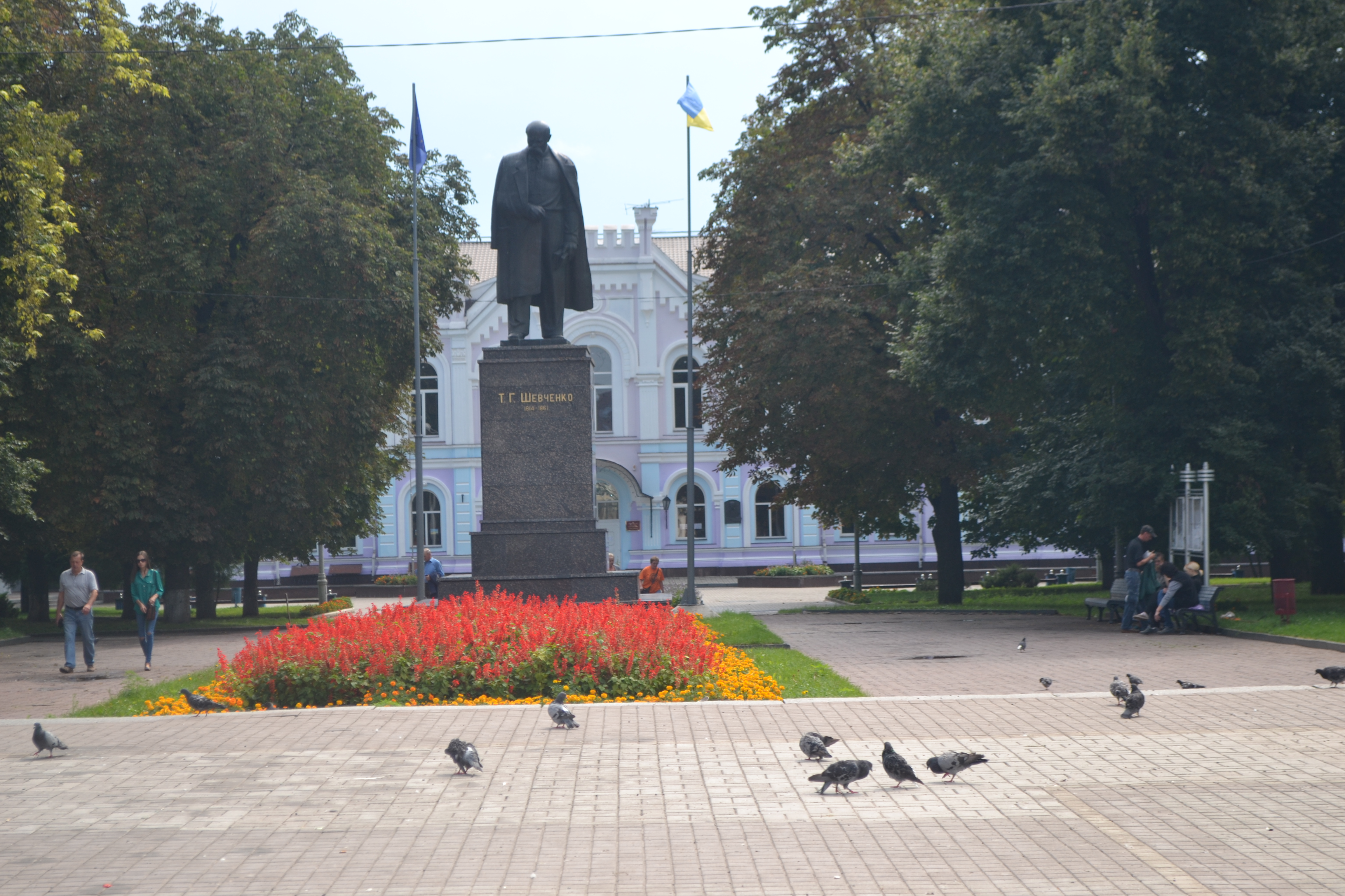 Пам'ятник Т. Г. Шевченку, Суми, вул. Соборна, сквер ім. Т. Г. Шевченка